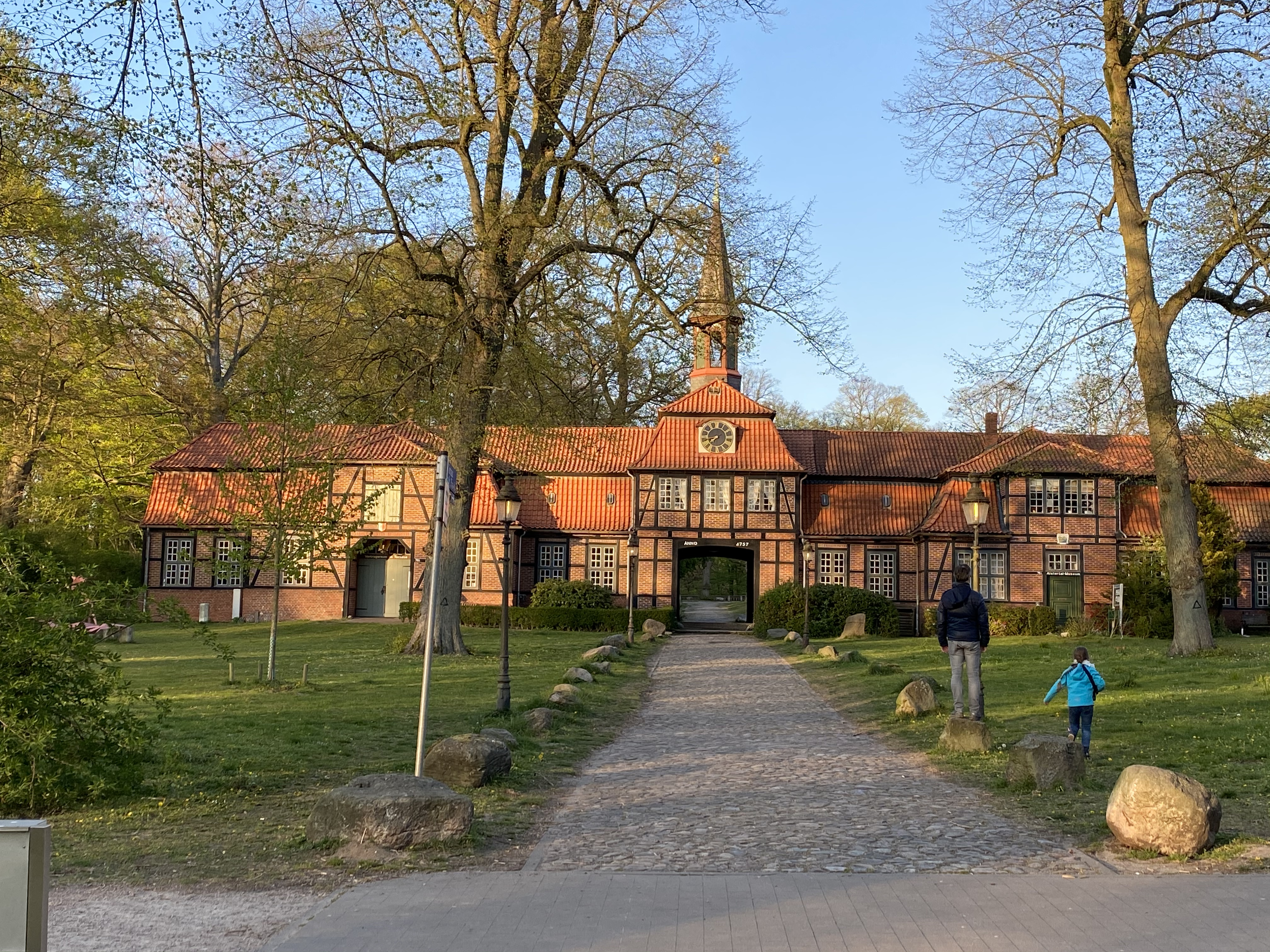 Liegt gegenüber des Herrenhauses Wellingsbüttel